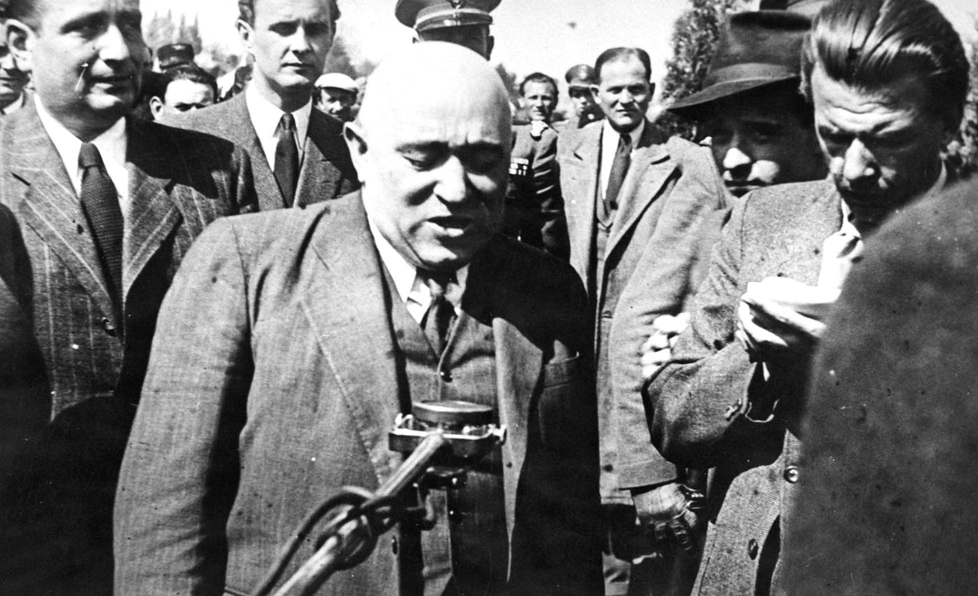 Minister Matt Rakosy (Hongarije)